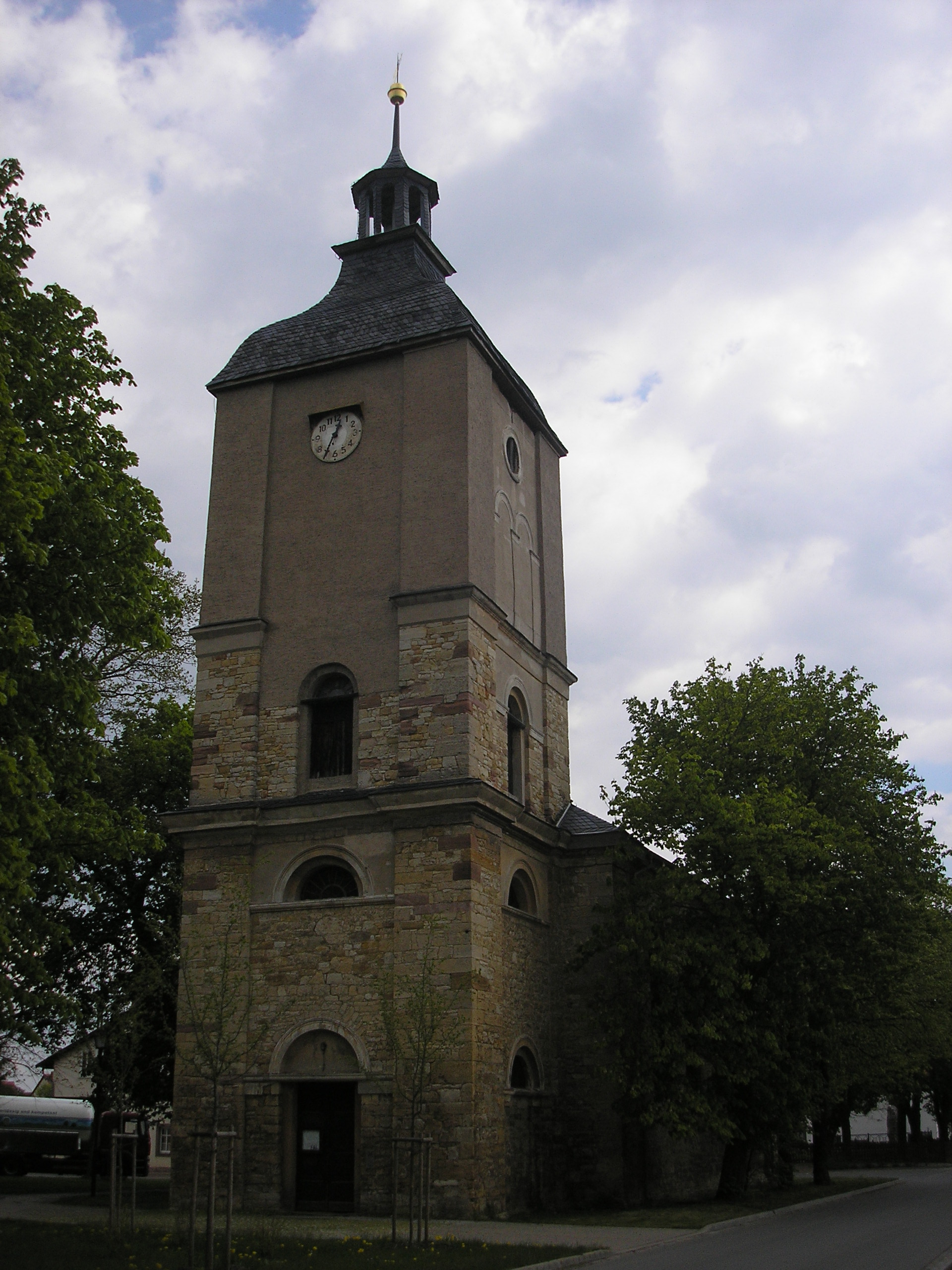 Die Kirche in Büchel (Thüringen).